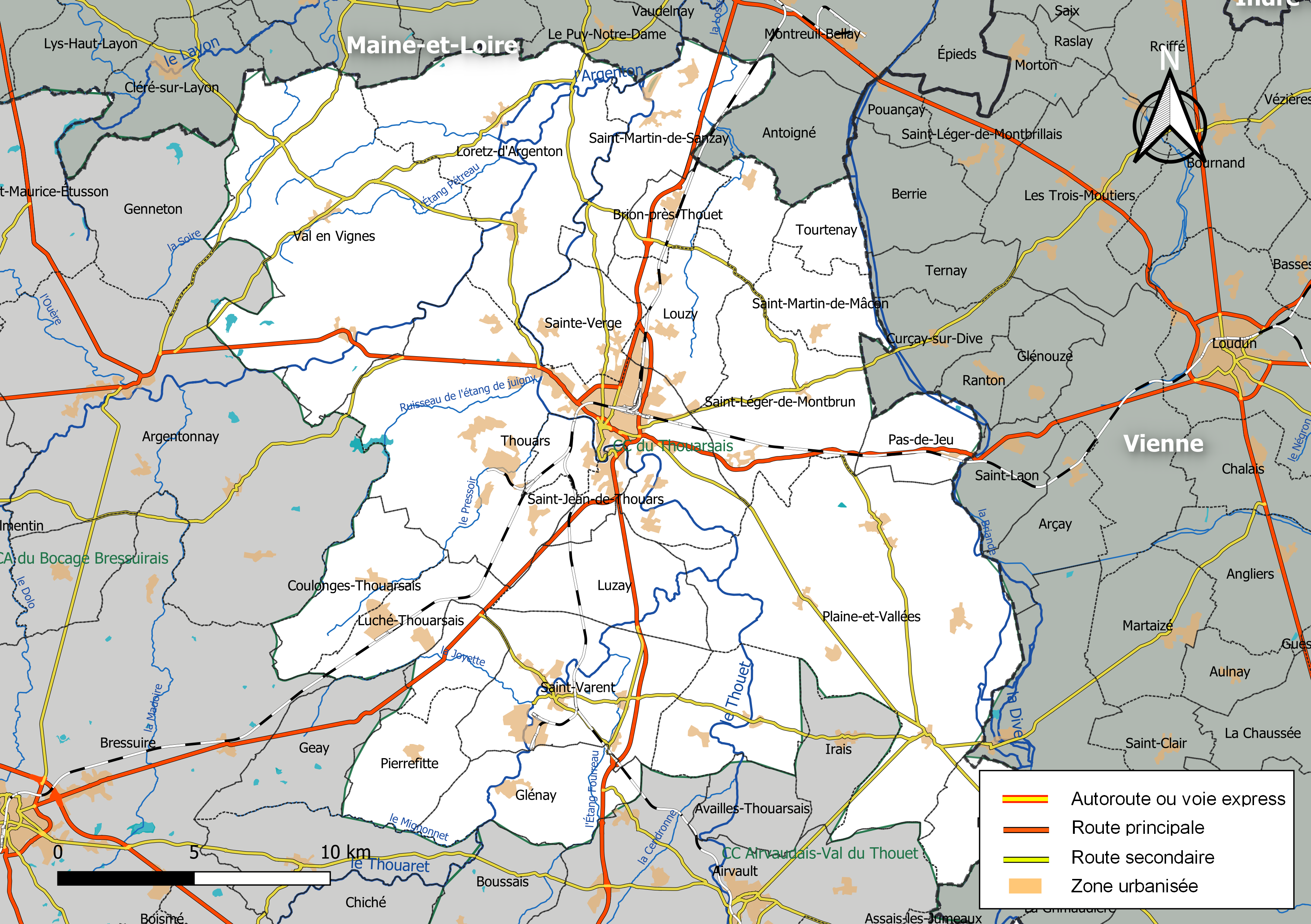 Carte géographique de la Communauté de communes du Thouarsais, département des Deux-Sèvres, France. Composition au 1er janvier 2019.